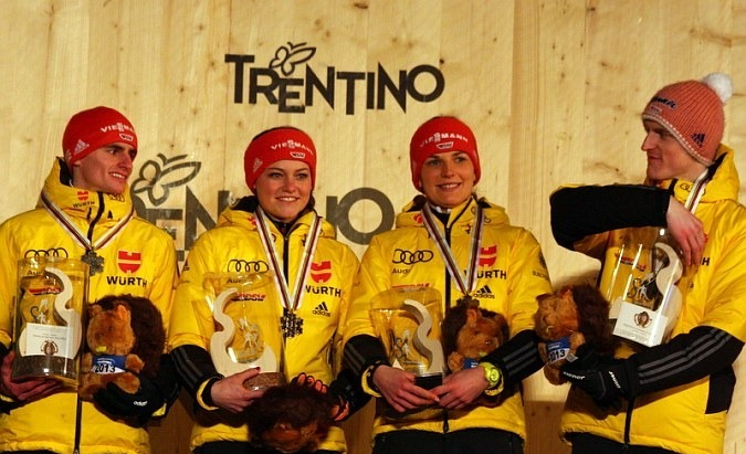 Richard Freitag, Carina Vogt, Ulrike Graessler i Severin Freund podczas dekoracji medalistów konkursu drużyn mieszanych na skoczni normalnej (Mistrzostwa Świata 2013, Val di Fiemme).